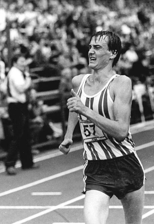 Ralf Kowalsky ADN-ZB Thieme 28.3.82 Berlin: Ralf Kowalsky verbesserte Geher-Weltrekorde- Bei DDR-offenen Wettbewerben seines Klubs TSC Berlin verbesserte Ralf Kowalsky (im Foto bei den DDR-Meisterschaften 1981 in Jena) im Jahn-Sportpark die Weltrekorde im Bahngehen über zwei Stunden auf 28 358 Meter und über 30 km auf 2:06.54 h.